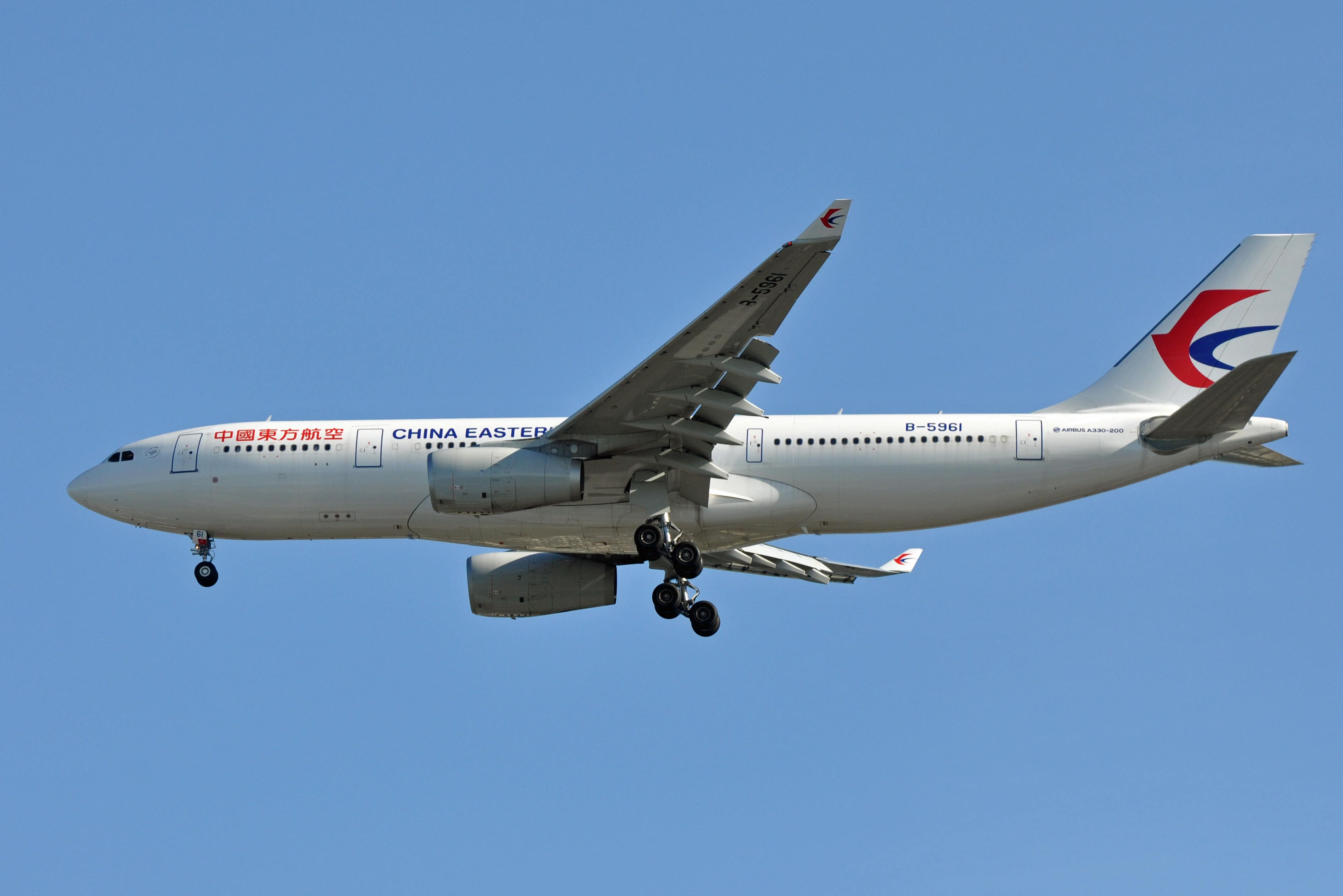 MSN 1569 A330-243 CHINA EASTERN AIRLINES YVR AIRPORT